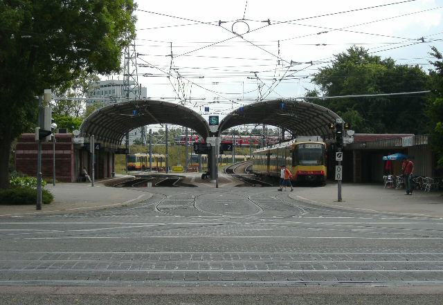 Albtalbahnhof in Karlsruhe, davor die Systemgrenze zwischen BOStrab (vorn) und EBO (hinten); rechts hinten die Rampe zur DB-Strecke Richtung Rastatt, links hinten die AVG-Strecke nach Ettlingen, dazwischen Abstellgleise